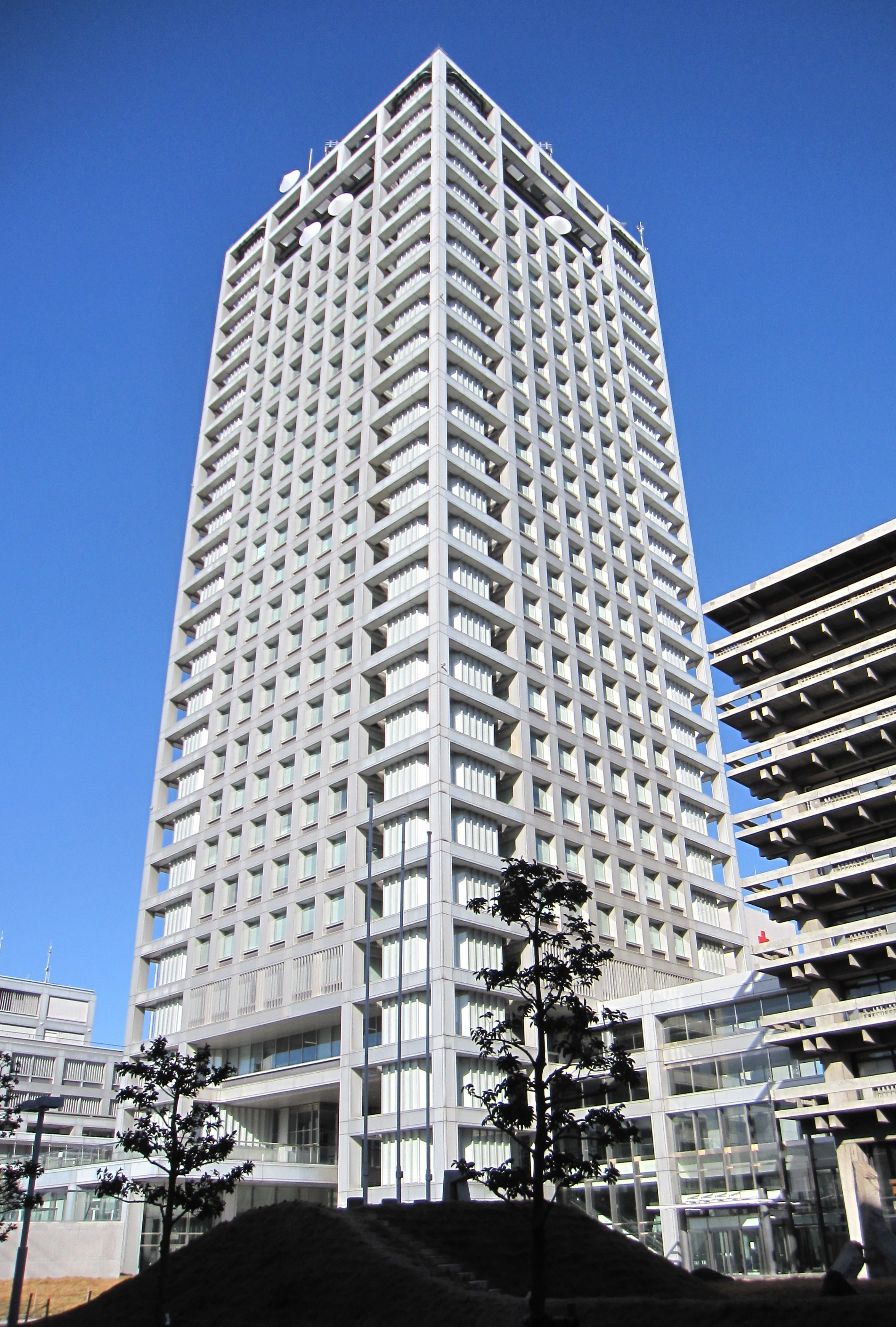 香川県庁本館